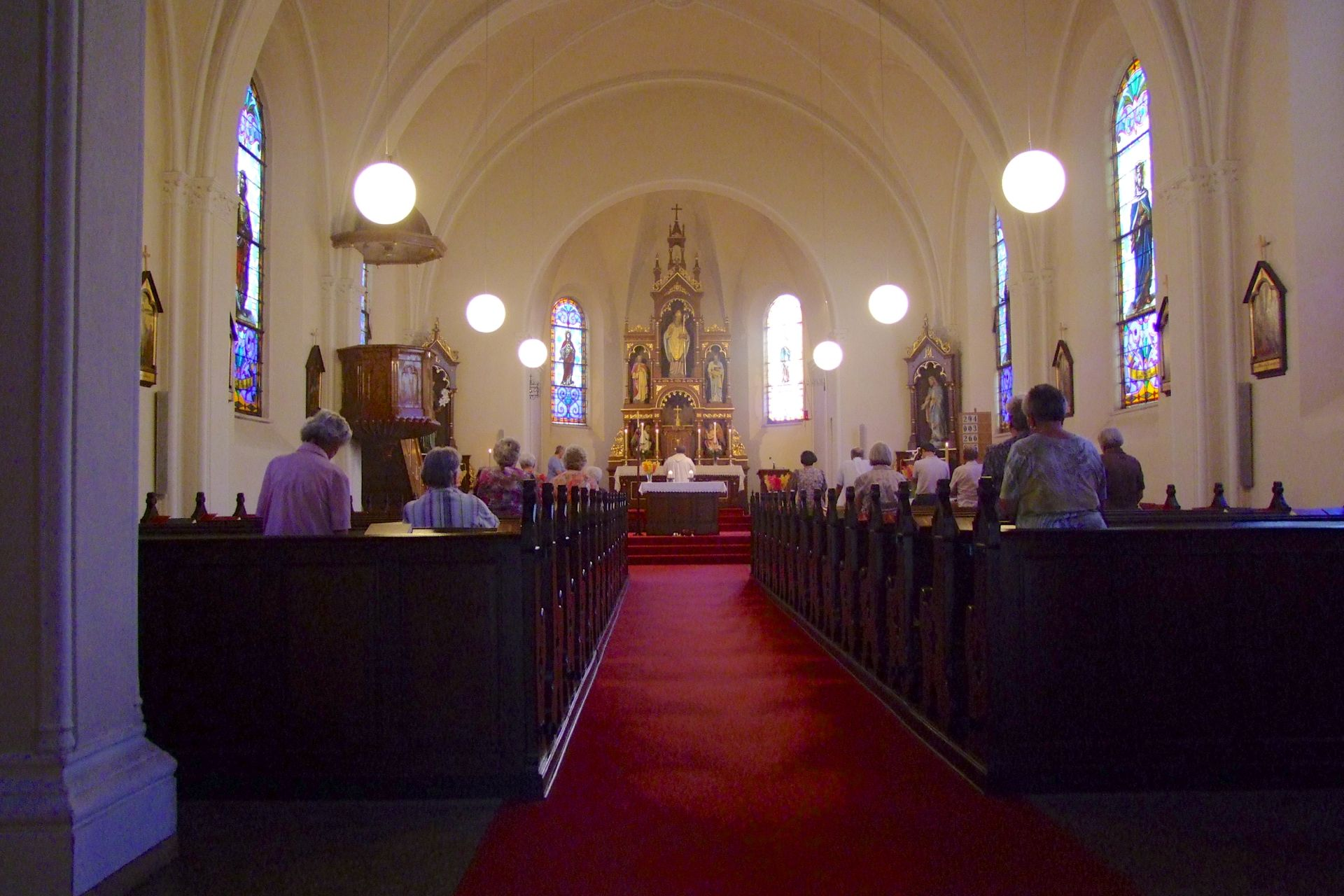 Kath. Pfarrkirche hl. Nikolaus